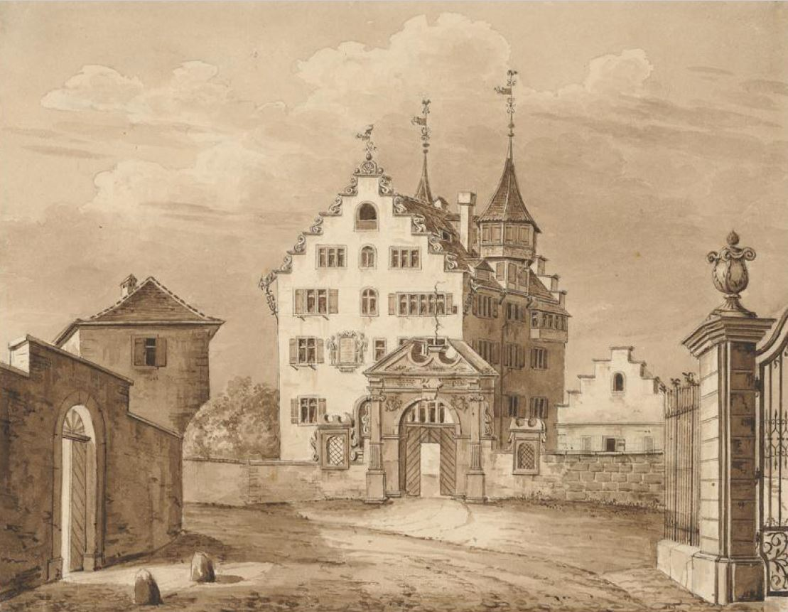 alter Seidenhof, Zürich, Schweiz, vor 1855